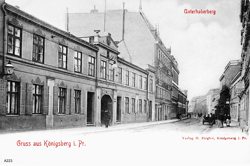 Königsberg